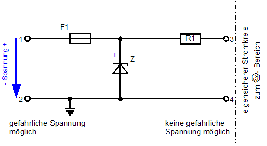 Zenerbarriere (Prinzipschaltbild) Andere Versionen: ./.